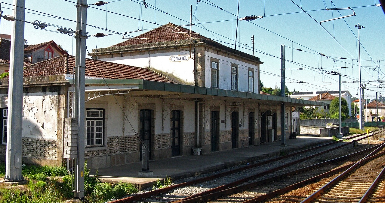 Penafiel